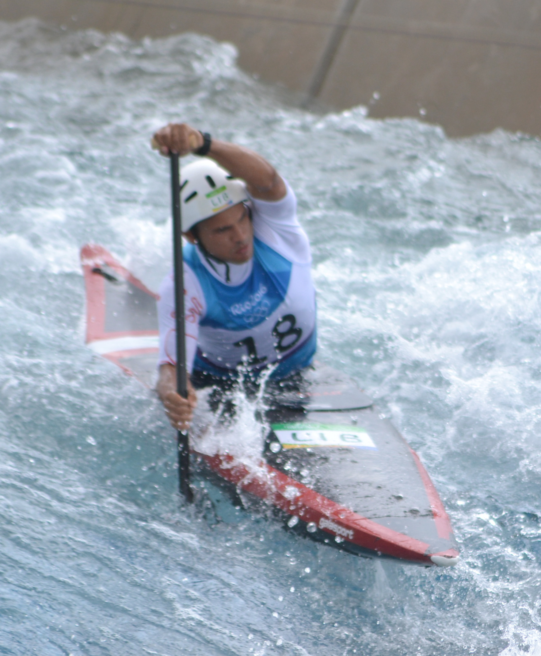 Richard Merjan